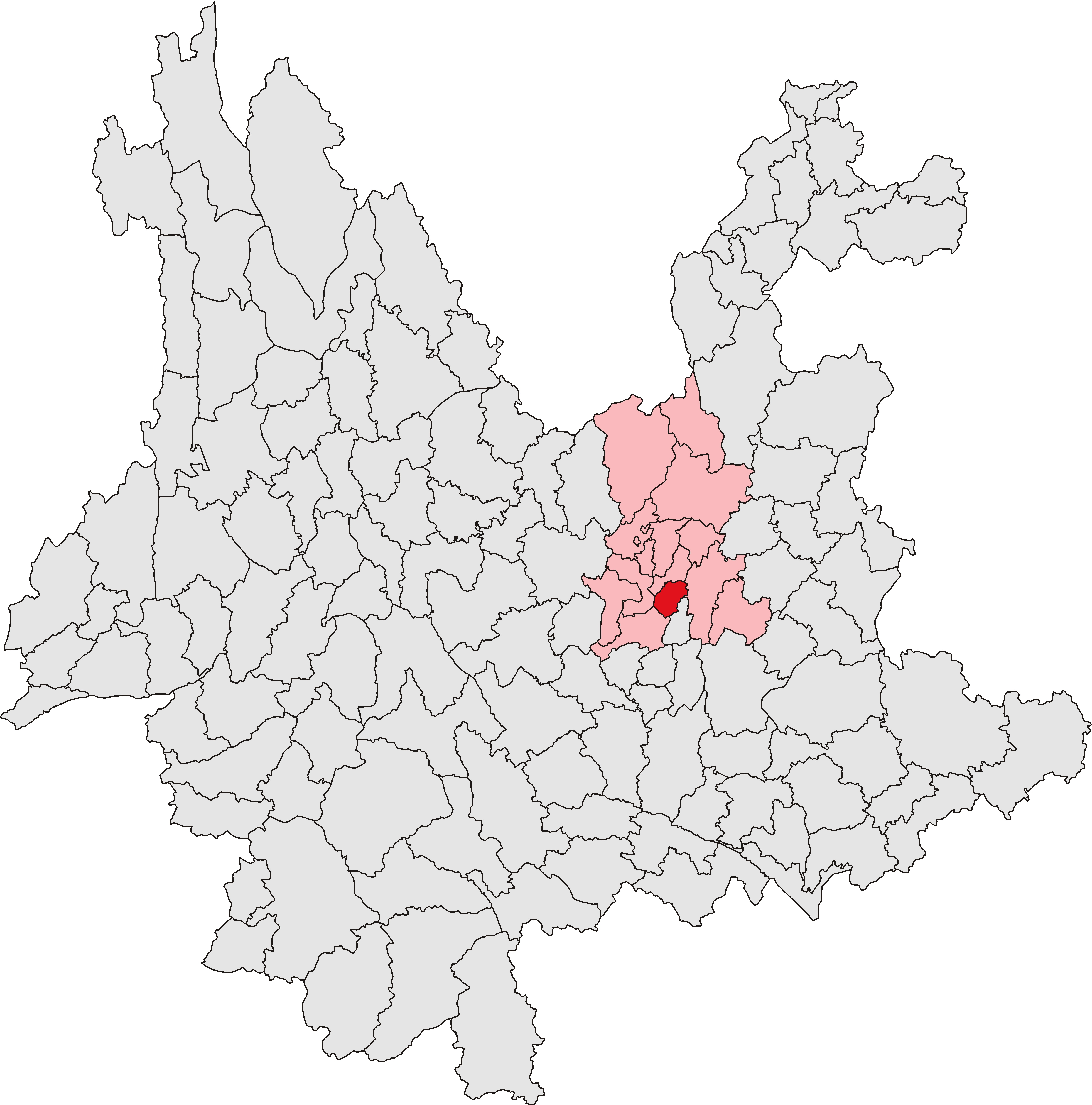 中文（中国大陆）: 呈贡区位置图